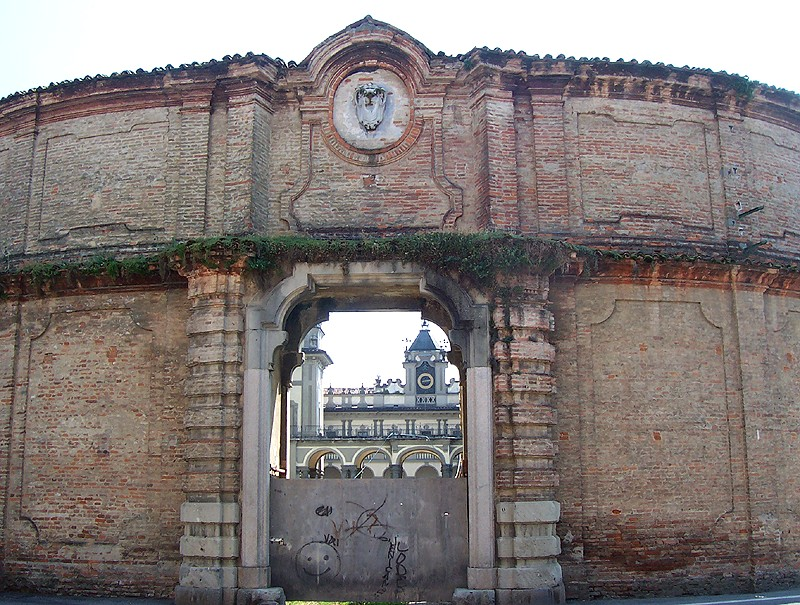 Brignano Gera d'Adda - Ingresso a Palazzo Visconti